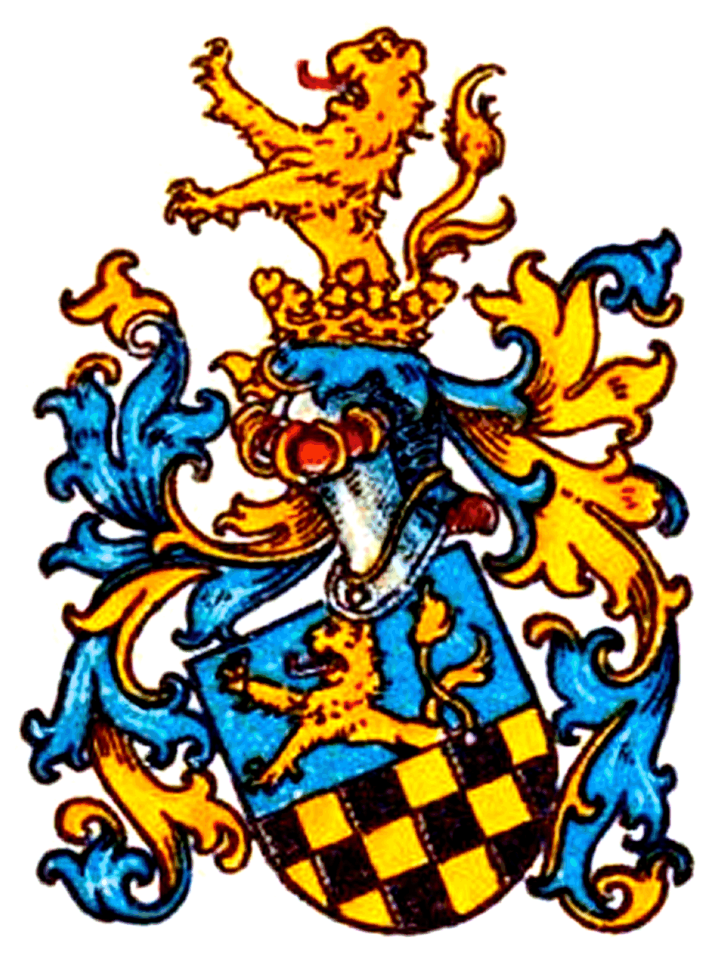 Wappen derer von Langen